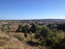 Vue globale du village depuis les hauteurs.